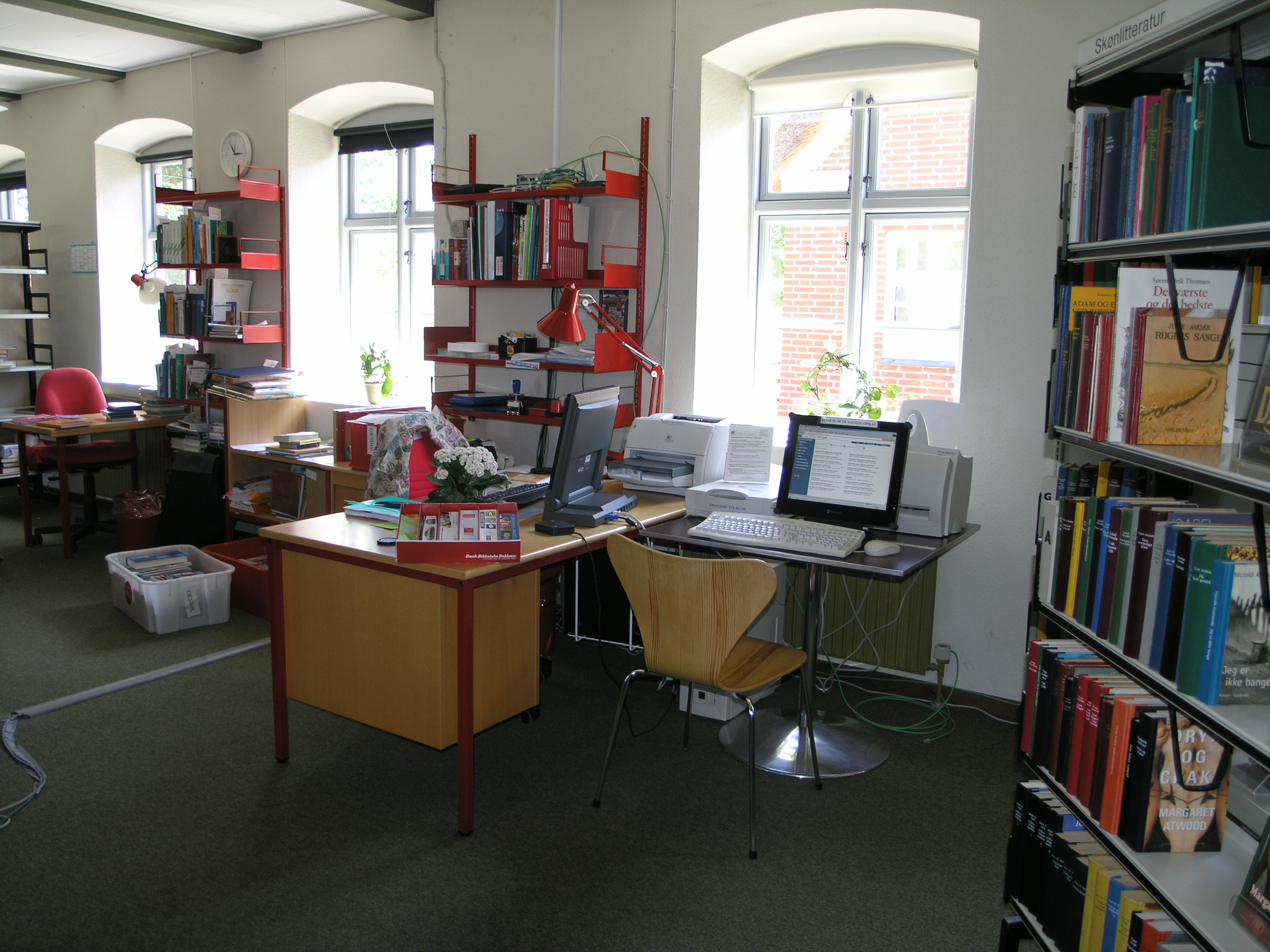 Oksbøl Bibliotek. Viser skranken